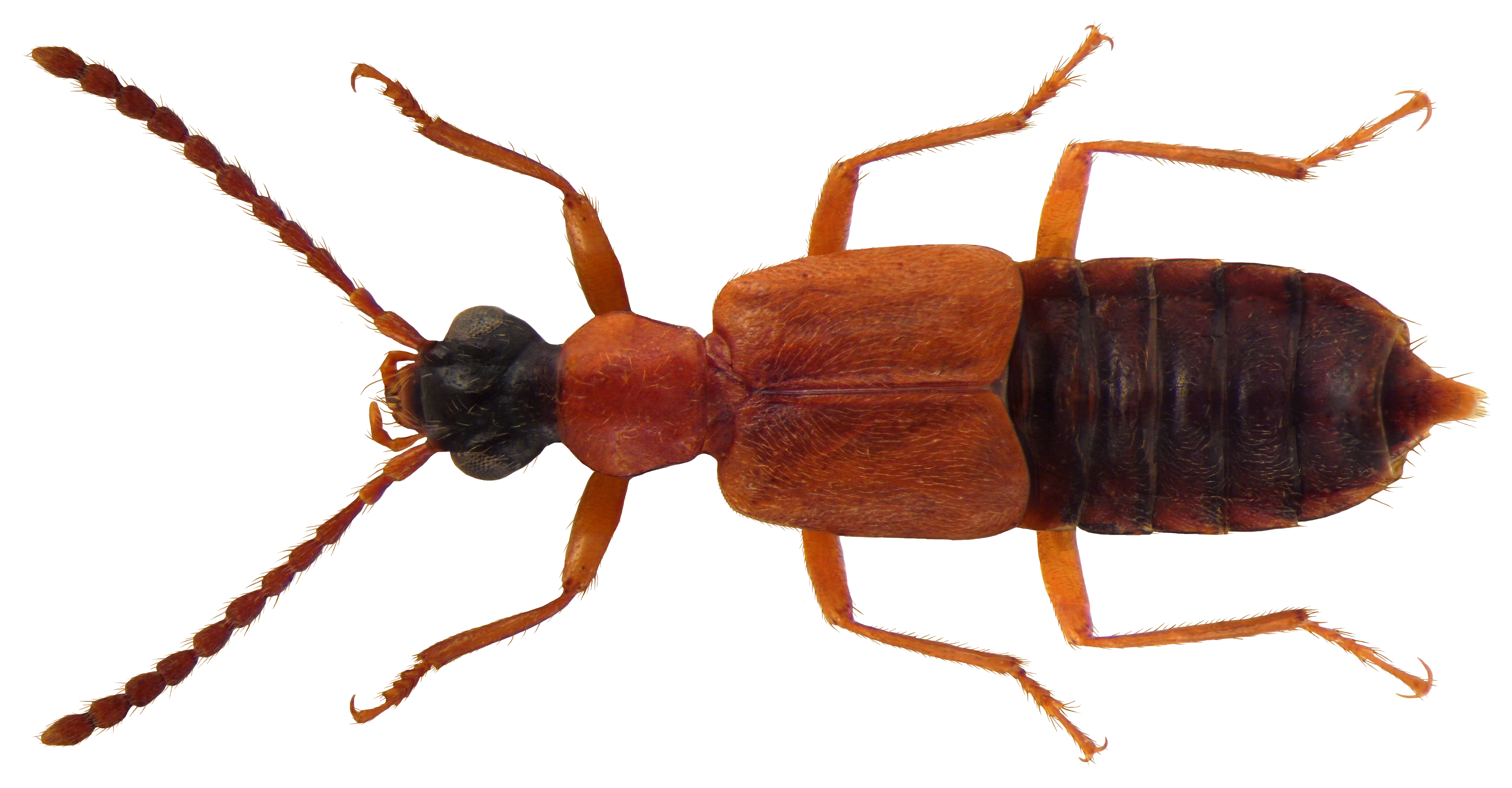 Familie: Staphylinidae Groesse; 6,5-8,5 mm Verbreitung: Europa Ökologie: an sandigen Ufern Fundort: Germania, Oberbayern, Bairawies, Einöd leg.det. U.Schmidt, 1972 Photo: U.Schmidt, 2010